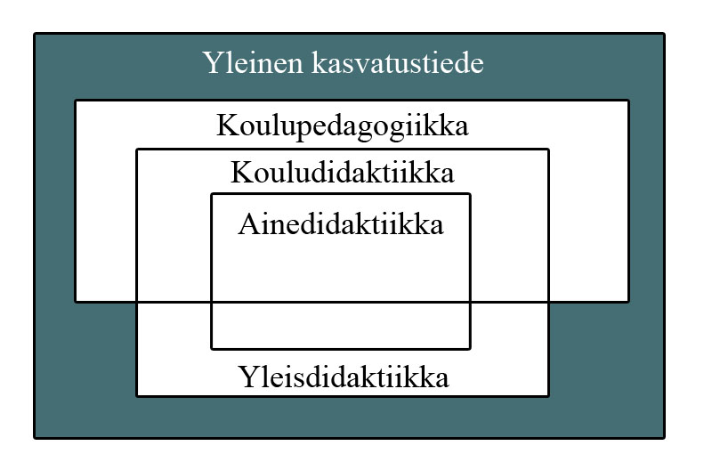 Didaktiikan suhde lähikäsitteisiin, alkuperäinen piirros Uljens, M. (1997)